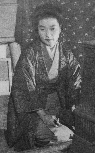 由起しげ子